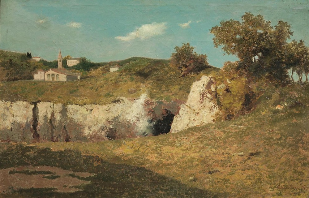 "Monte Donato", olio su tela, 86x130 cm, firmato, collezione privata